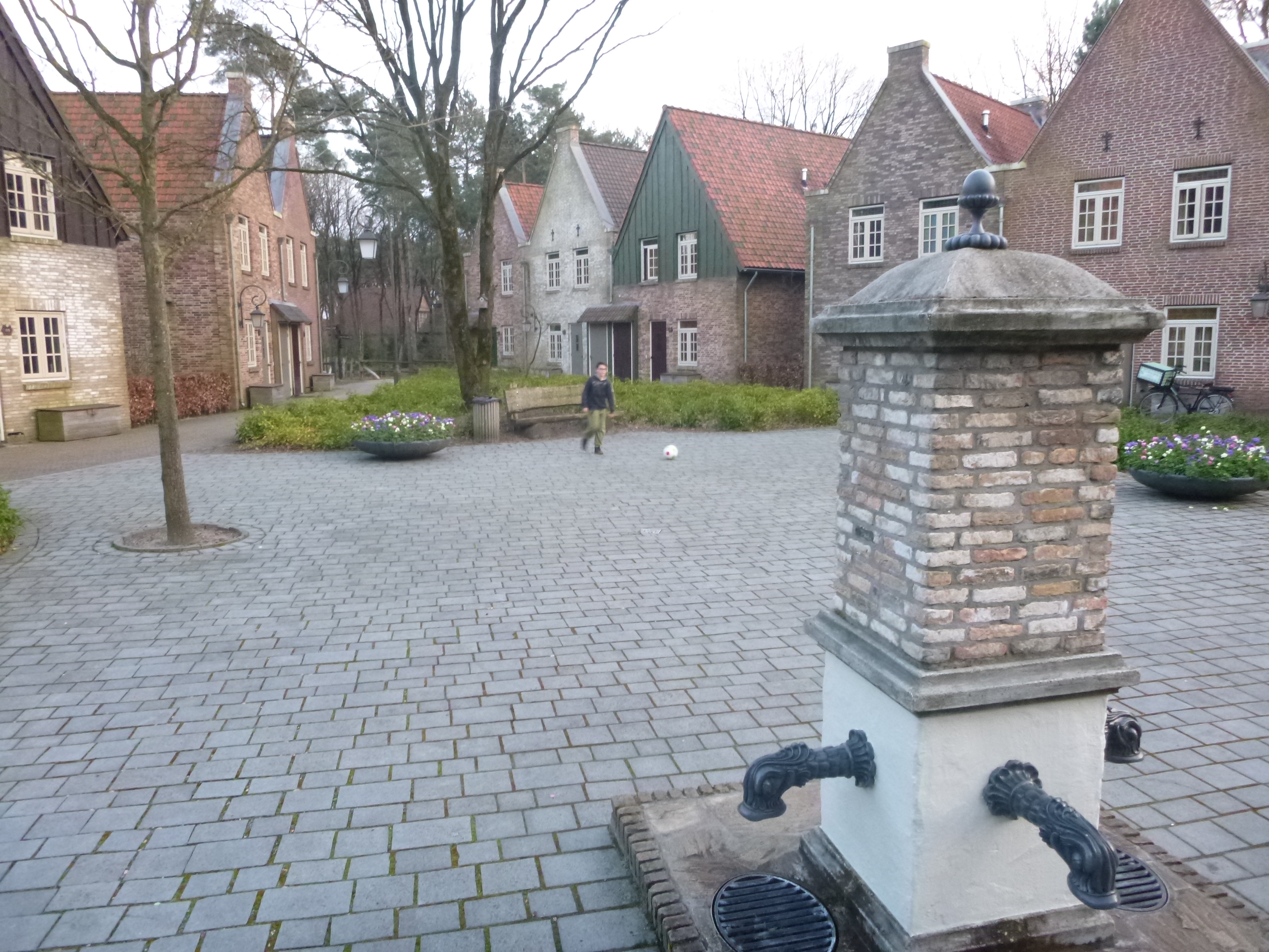 Dorpsplein in Bosrijk